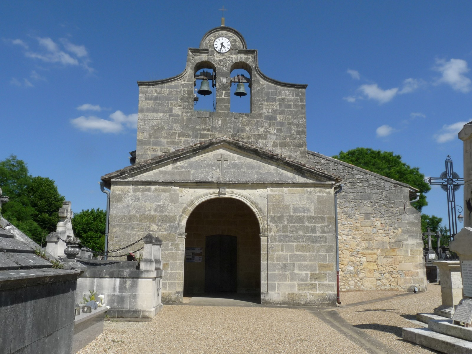 Eglise de Savignac-de-l'Isle, Gironde, France